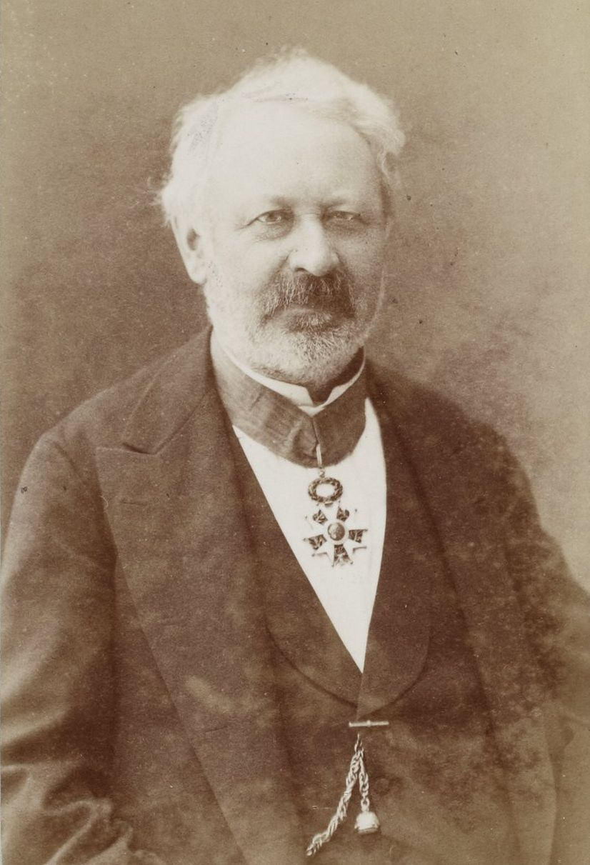 Alfred Maury par Eugène Pirou